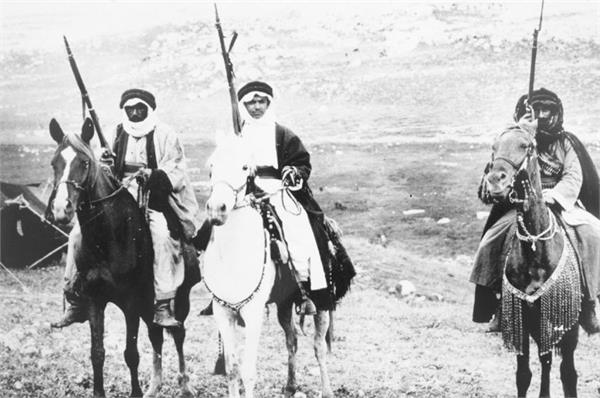 גליל - רוכבים בדואים